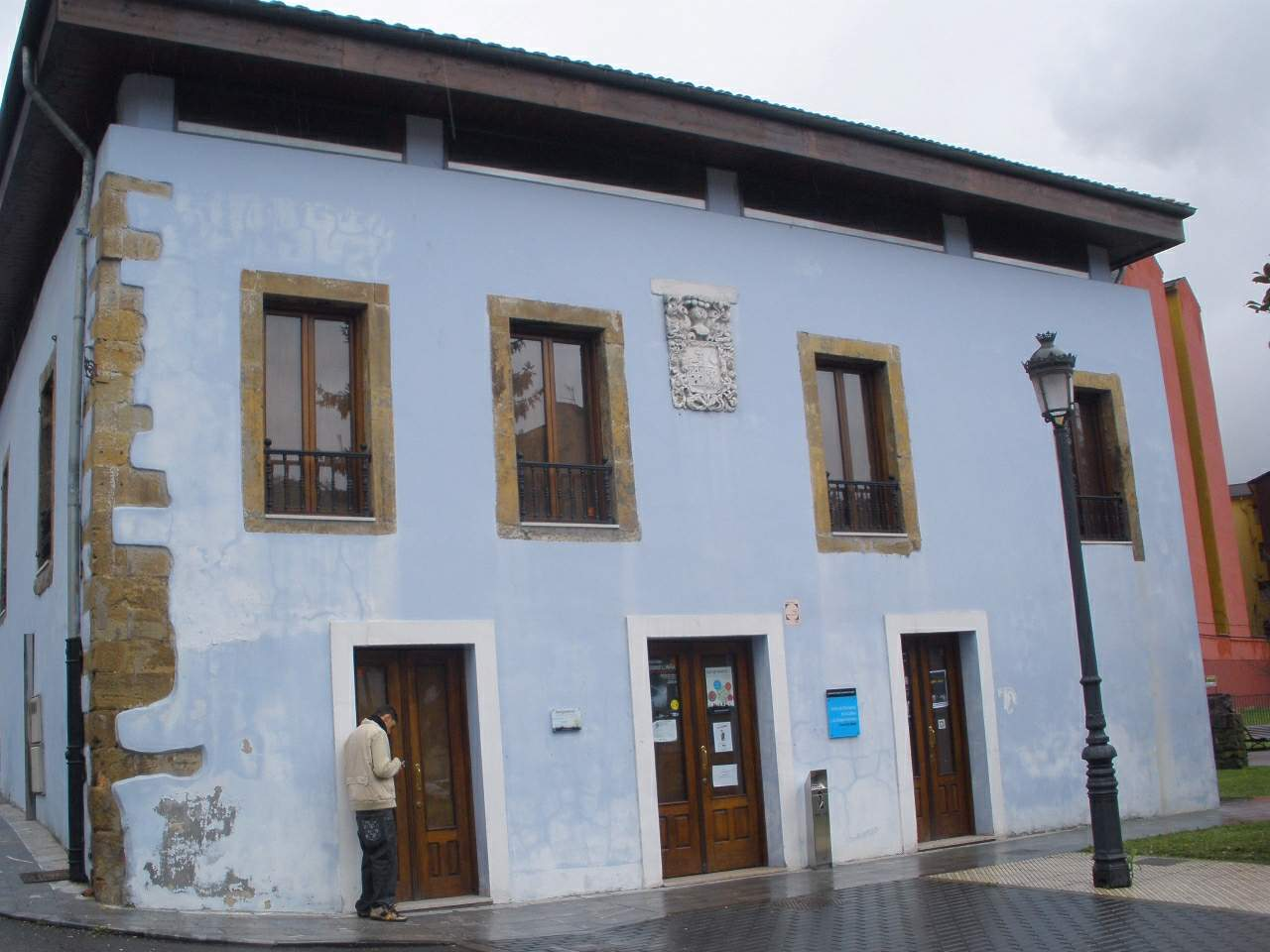 Ciaño (Langreo) - Casa de los Alberti